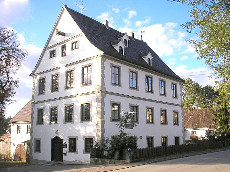 Schloss Kissing (Landkreis Aichach-Friedberg, Bayerisch-Schwaben). Gesamtansicht von Osten. Eigene Aufnahme, Oktober 2006 / Kissing castle (Bavaria, Germany). Total view from the east. Own photo, Oct. 2006